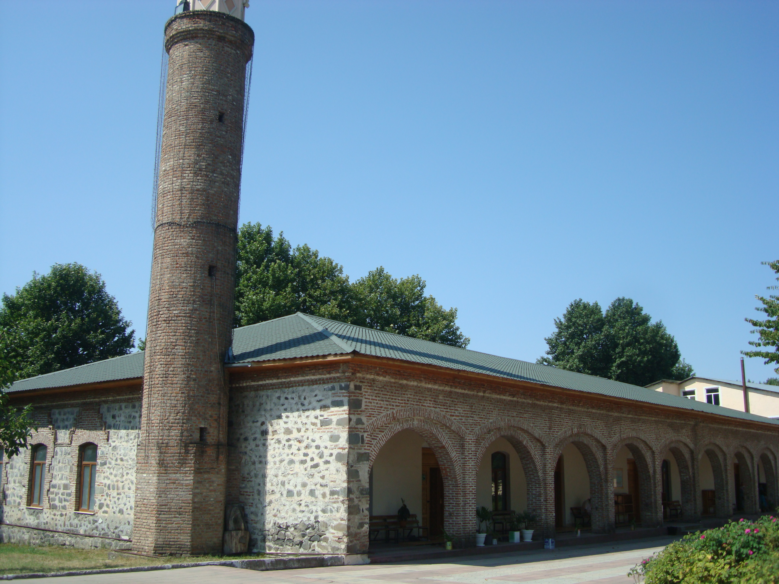 Мечеть 18 века в Габале